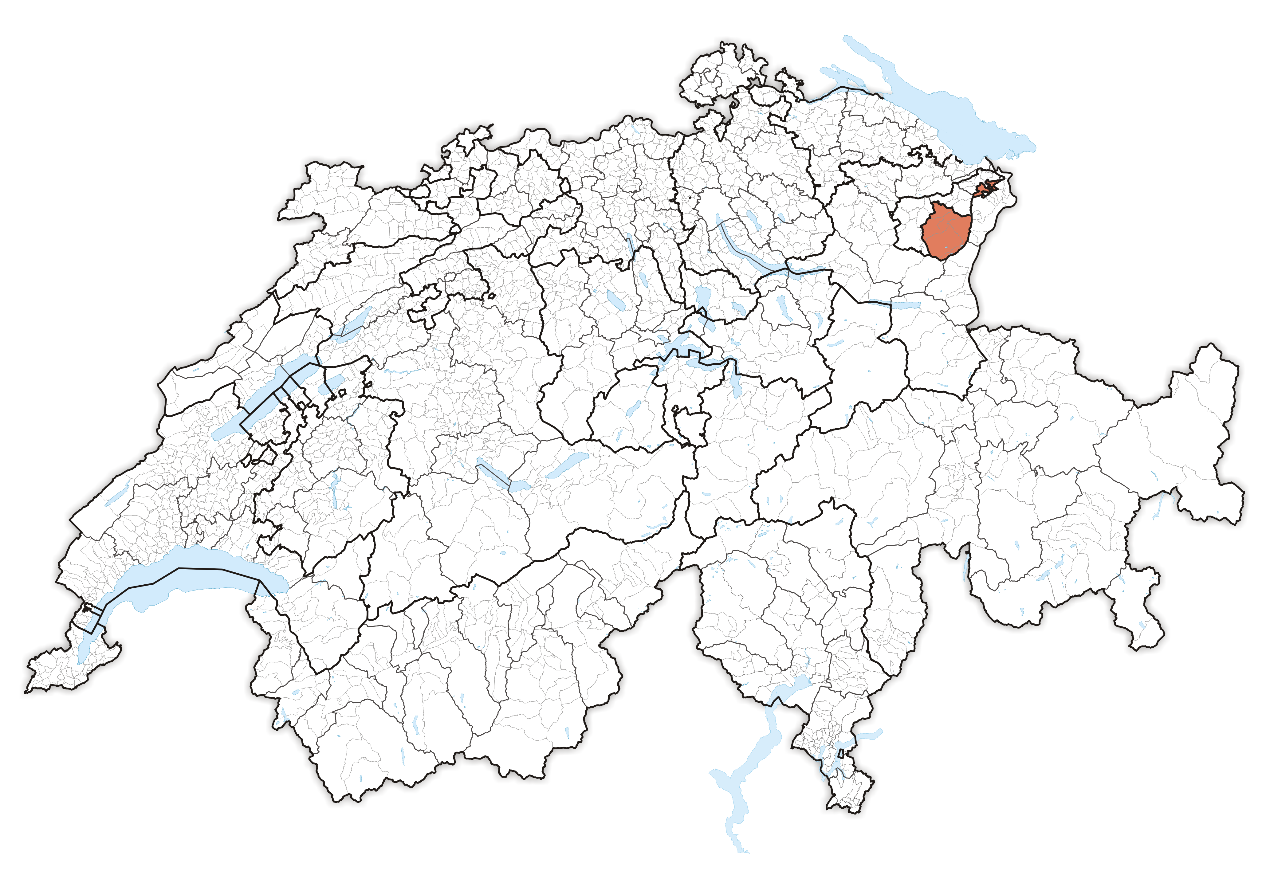 Canton Appenzell Innerrhoden